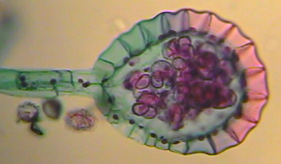 Esporangio diploide en helechos, produce esporas haploides.